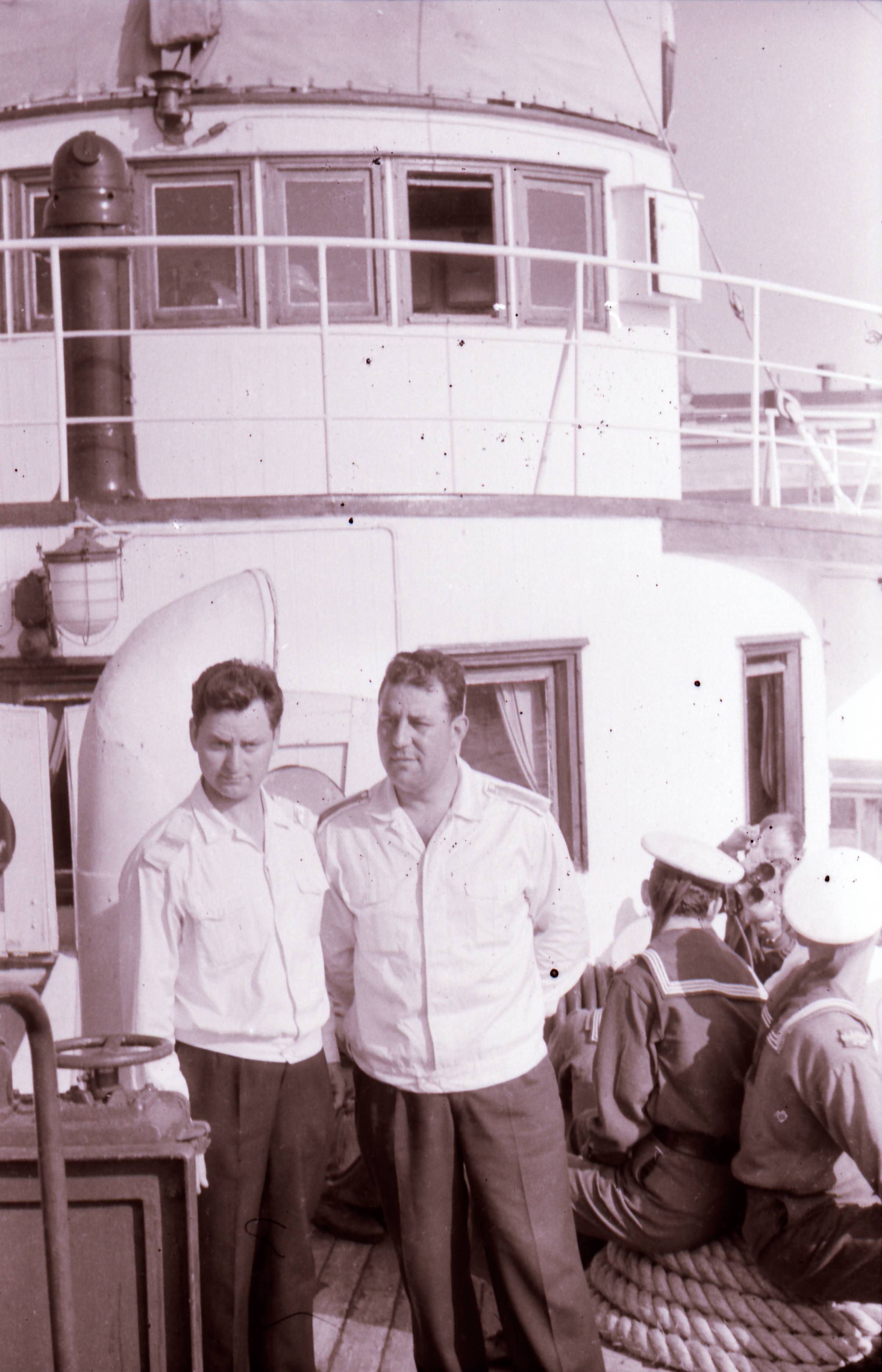 Das Segelschiff Gorjanin, Segelschiff Gorjanin, H. Dimitrov - Choni